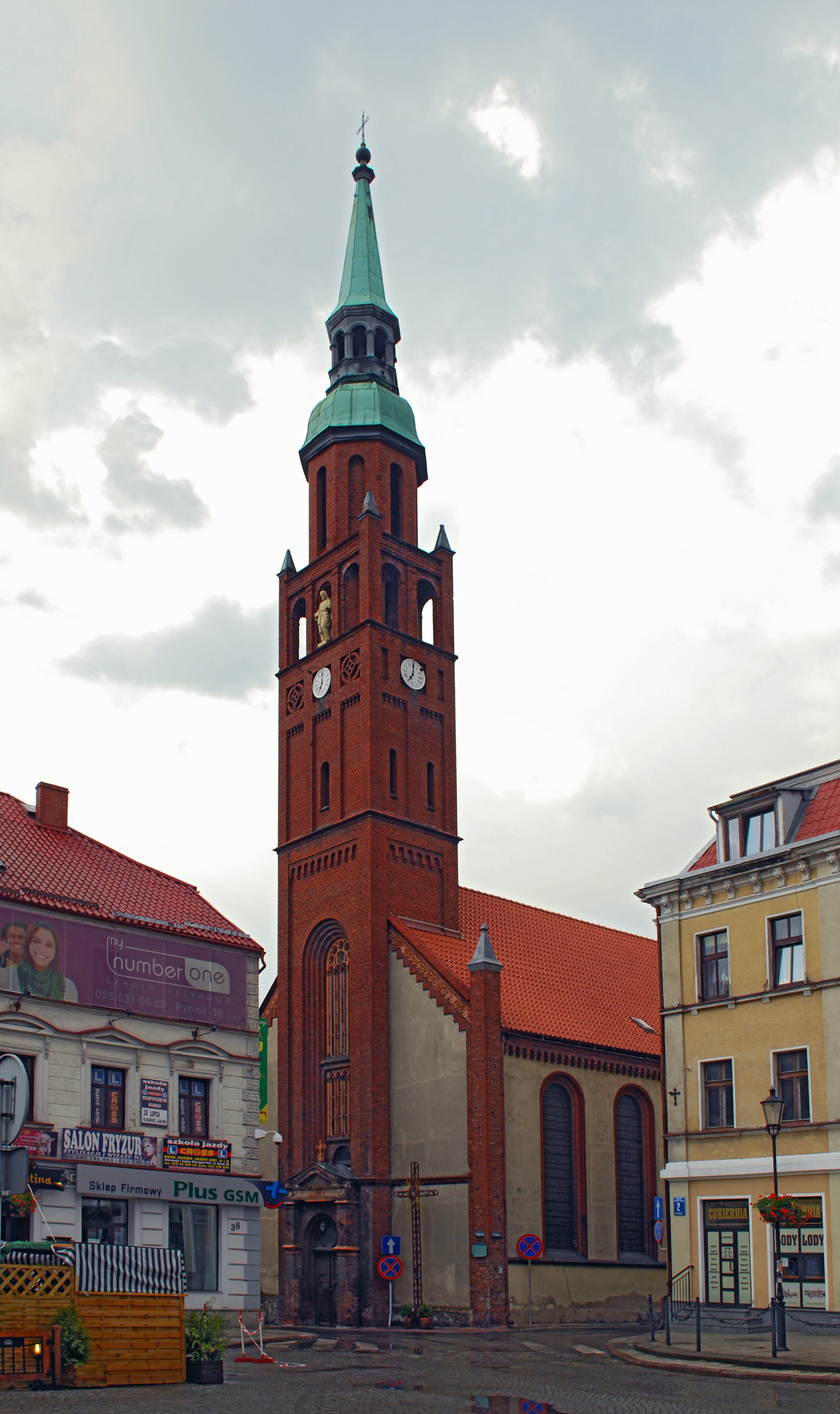 Kościół św. Katarzyny w Starogardzie Gdańskim.